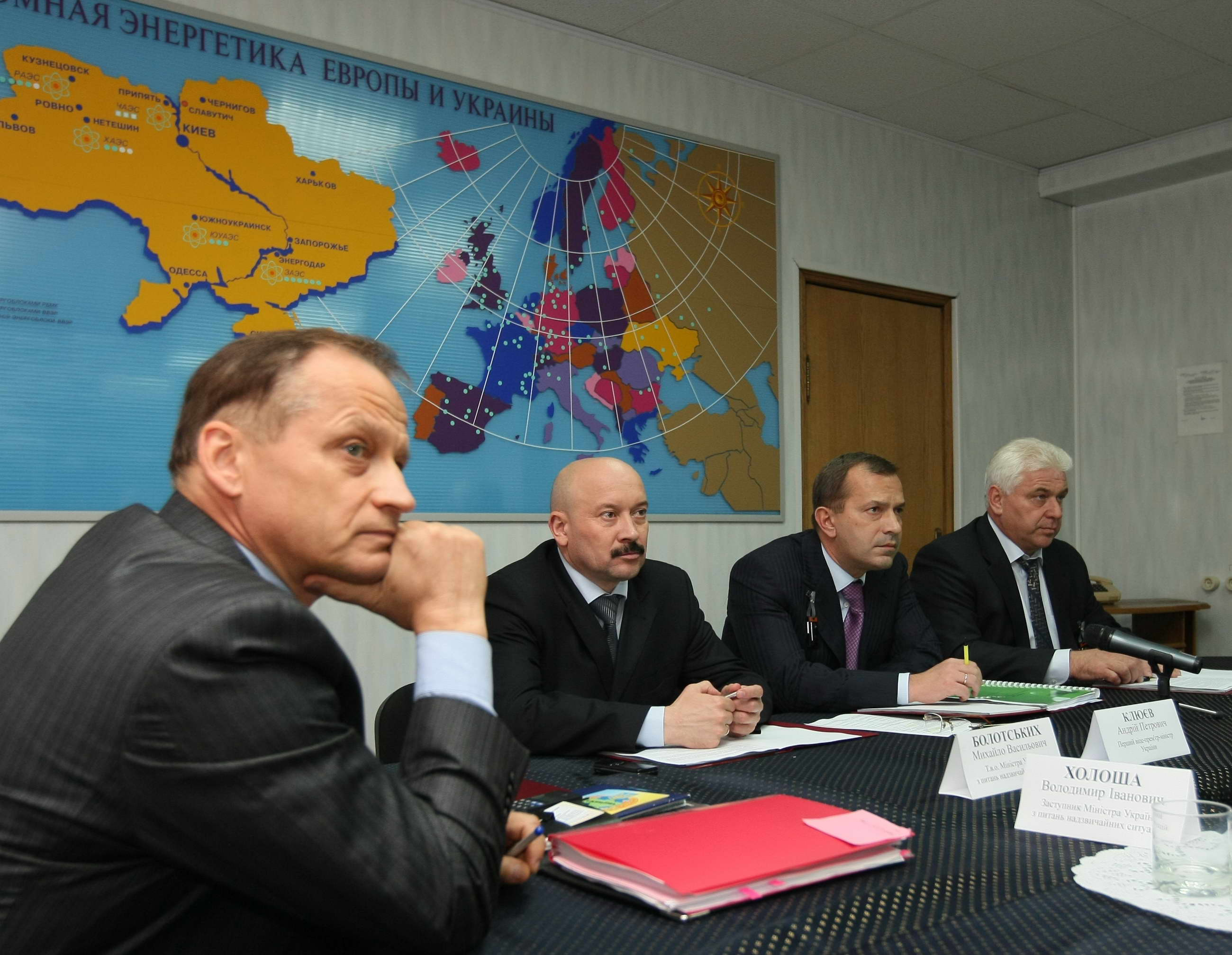 Клюев. Совещание по реализации чернобыльских проектов 23.09.2010